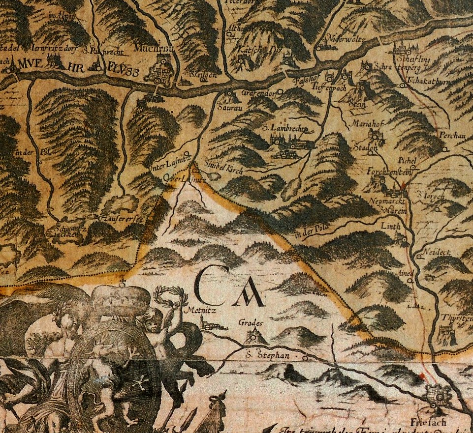 Das Gebiet Laßnitz zwischen Murau und Friesach